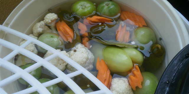 македонски специјалитет, традиционална есенска салата, мешавина од краставички, моркови, карфиол и по некое зелено доматче.